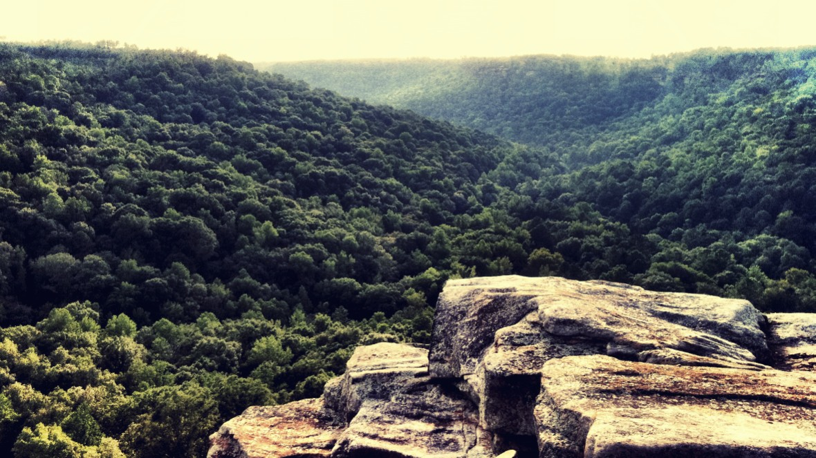 Buck's Pocket